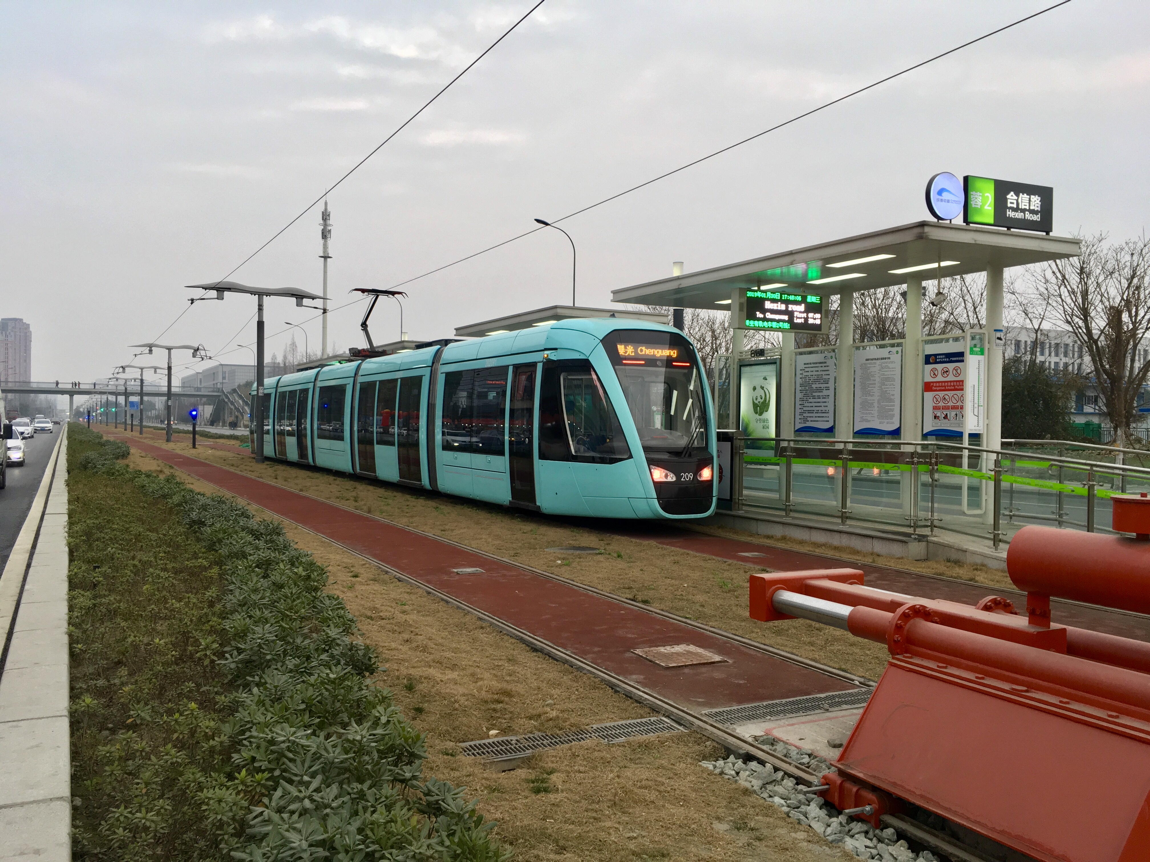 一列停靠于合信路站的成都有轨电车蓉2号线列车